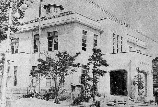 旧氷見町役場および氷見市役所庁舎(富山県)